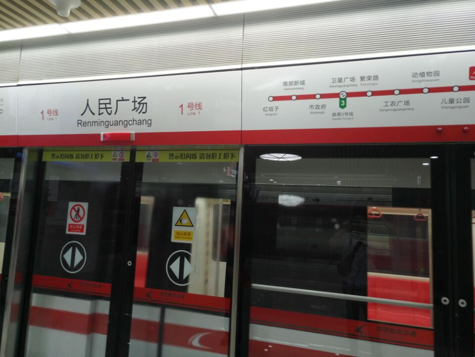 长春人民广场站屏蔽门